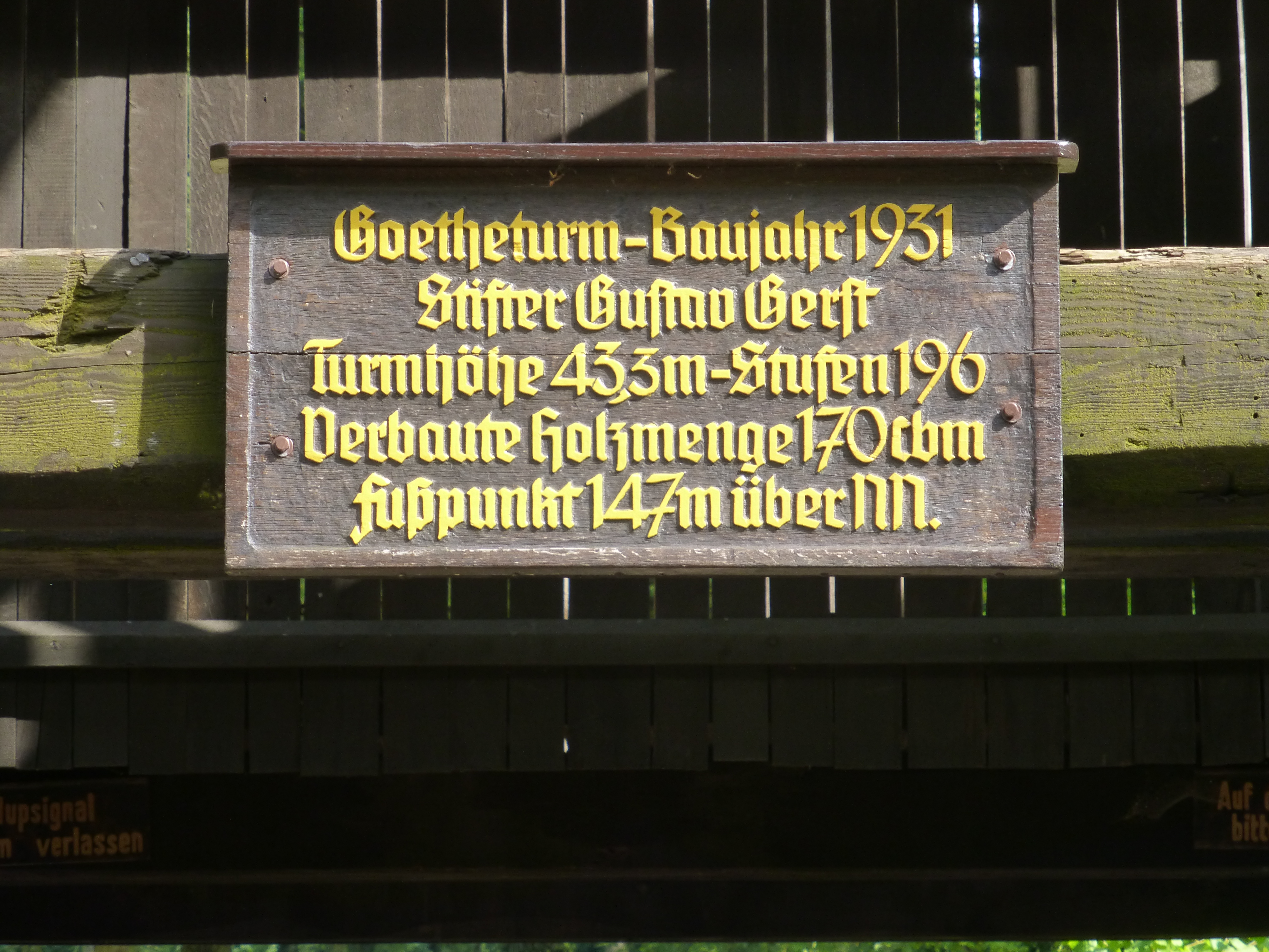 Schild am Goetheturm Frankfurter Stadtwald, zunächst anonymer Stifter Gustav Gerst, Warenhaus H.& C. Tietz Frankfurt am Main, Niederräder Landstraße 10; 1937 entrechtet und in die USA emigriert